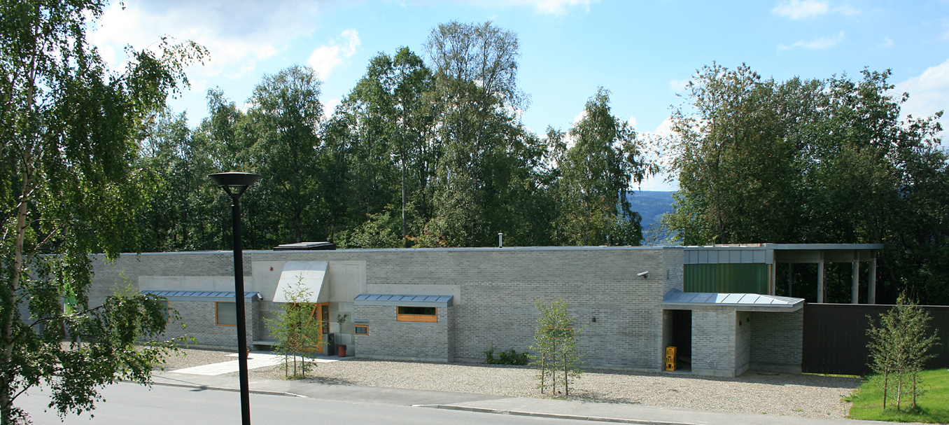 Publikumsbygget, Bjerkebæk, Lillehammer.